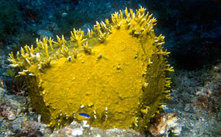 Millepora alcicornis coloniza gorgonia, tras recubrirla por completo desarrolla sus estructuras ramificadas habituales. Santuario Nacional Marino de Flower Garden Banks. EE.UU.